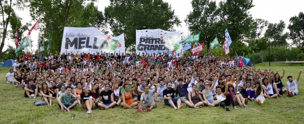 Militancia Mella